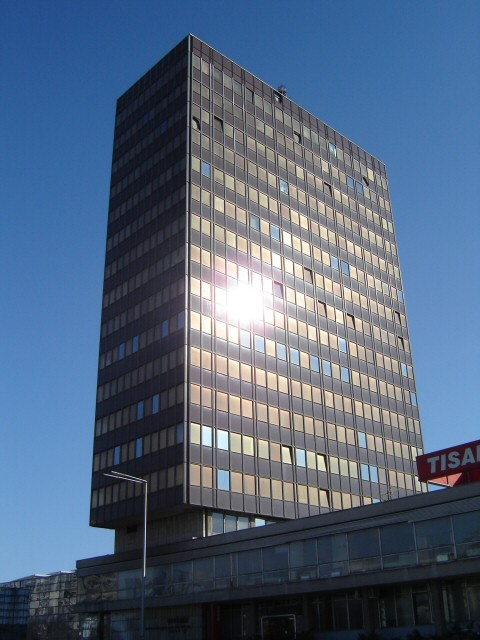 Vjesnikov neboder, Sliku ustupio Endimion17